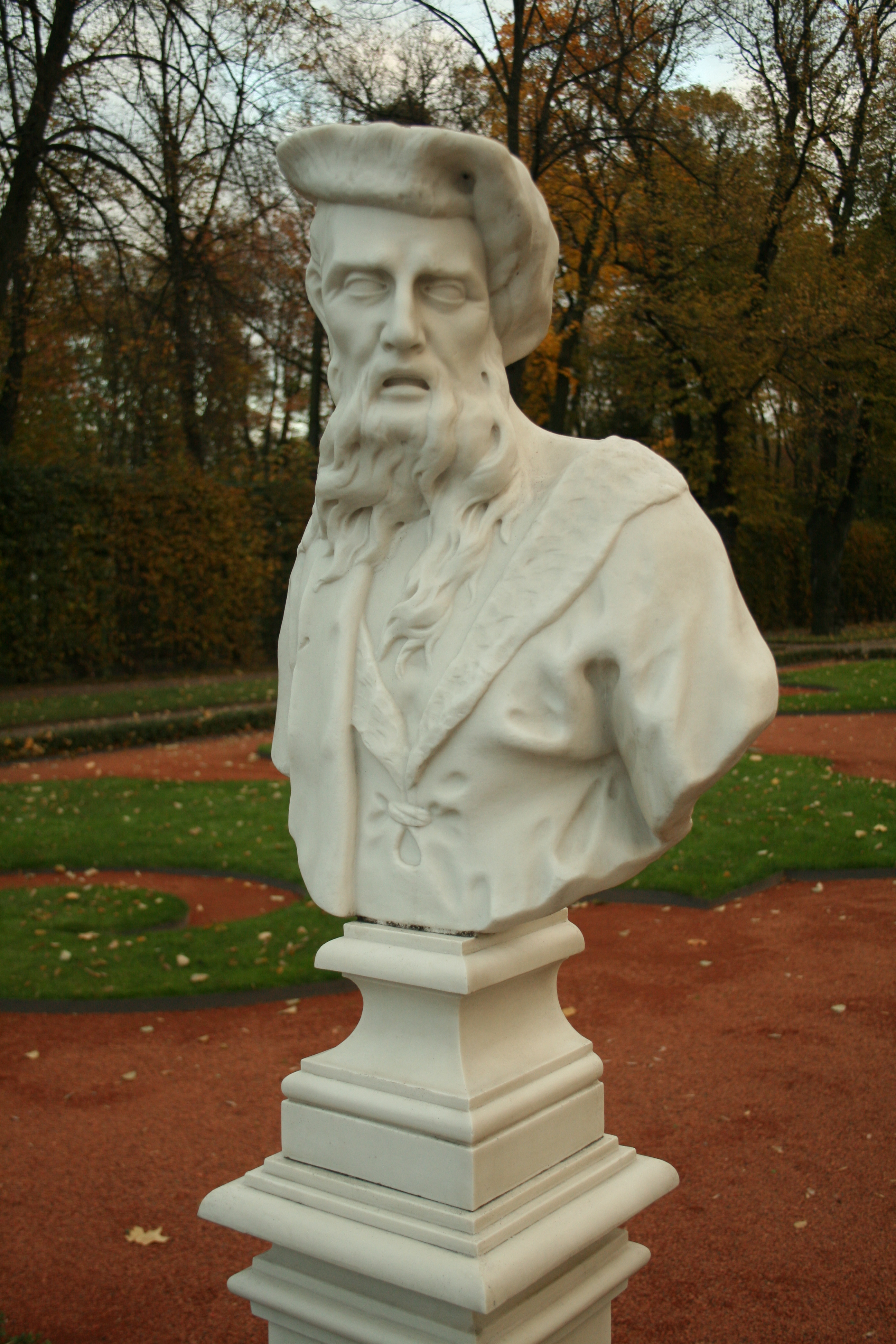 Бюст Эскулапа (Санкт-Петербург и Лен.область, Санкт-Петербург, партер, северная часть)